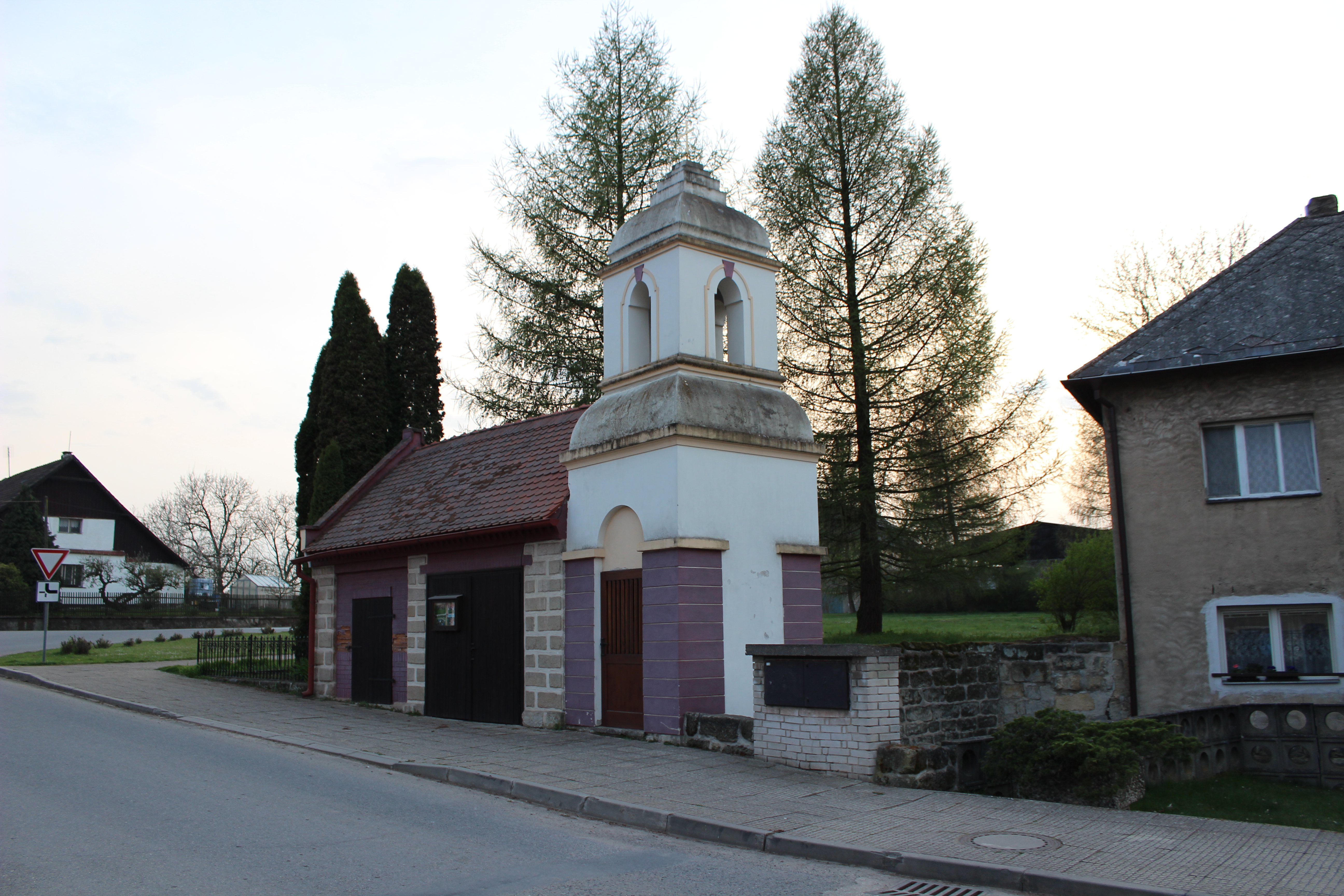 Kaplička ve Velkých Všelisech. This photograph was taken with a Canon EOS 600D.